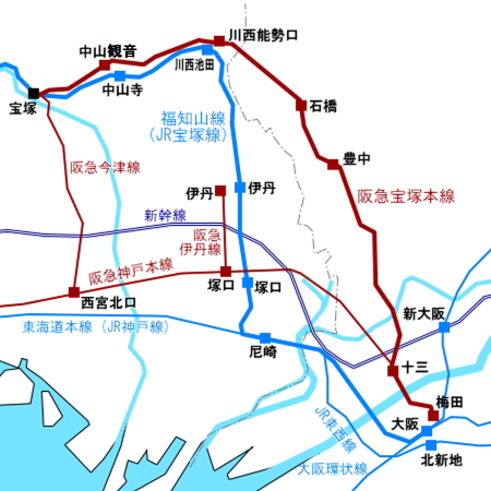 大阪 - 宝塚間で競合する鉄道の路線図